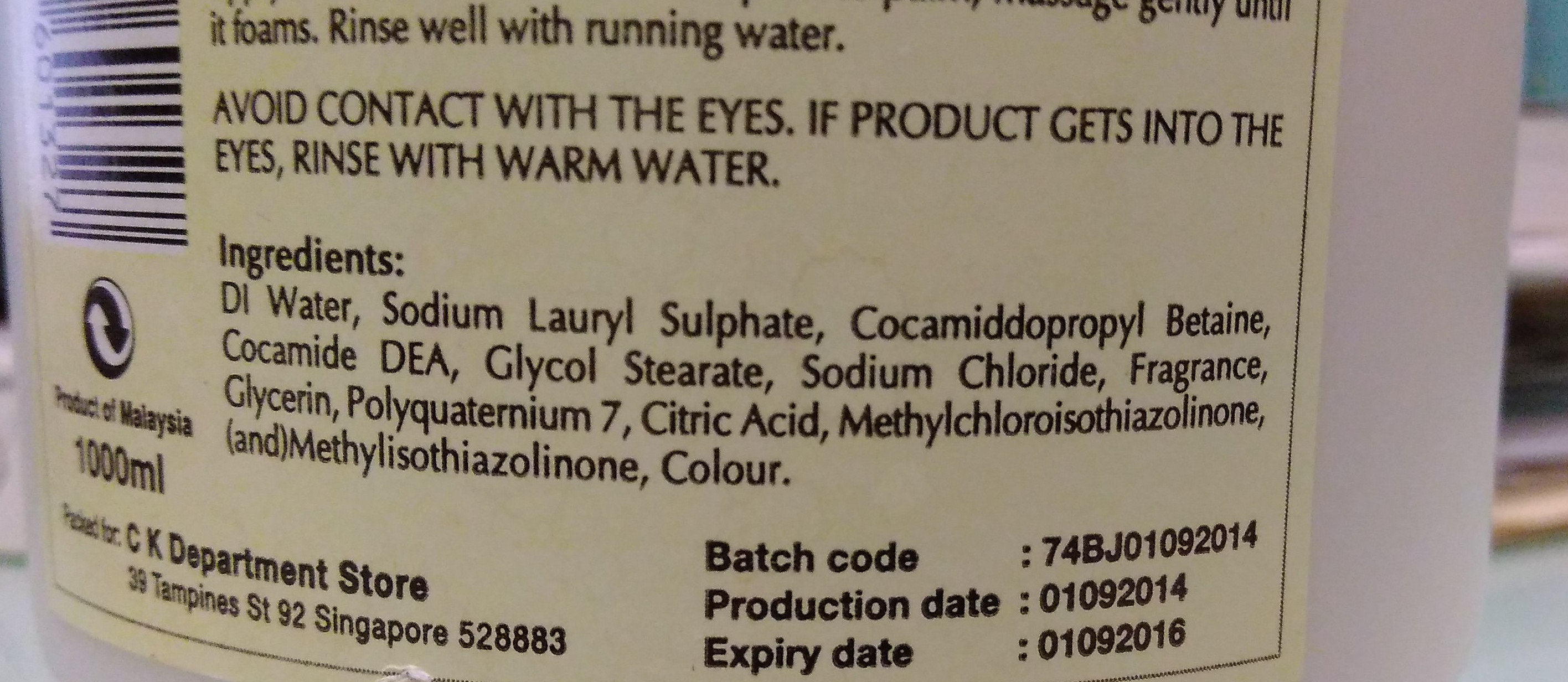 ये एक हाथ साफ़ करने वाले साबुन (लिक्विड) के संघटकों की तस्वीर है - सामान्य घटकों को दिखाने के लिए । यह मलेशिया में बने मॉर्निंग विंड का साबुन है जो सिंगापुर में अगस्त २०१५ में ख़रीदा गया । निर्माताओं के मुताबिक, इसमें बकरी का दूध भी इस्तेमाल किया गया है ।